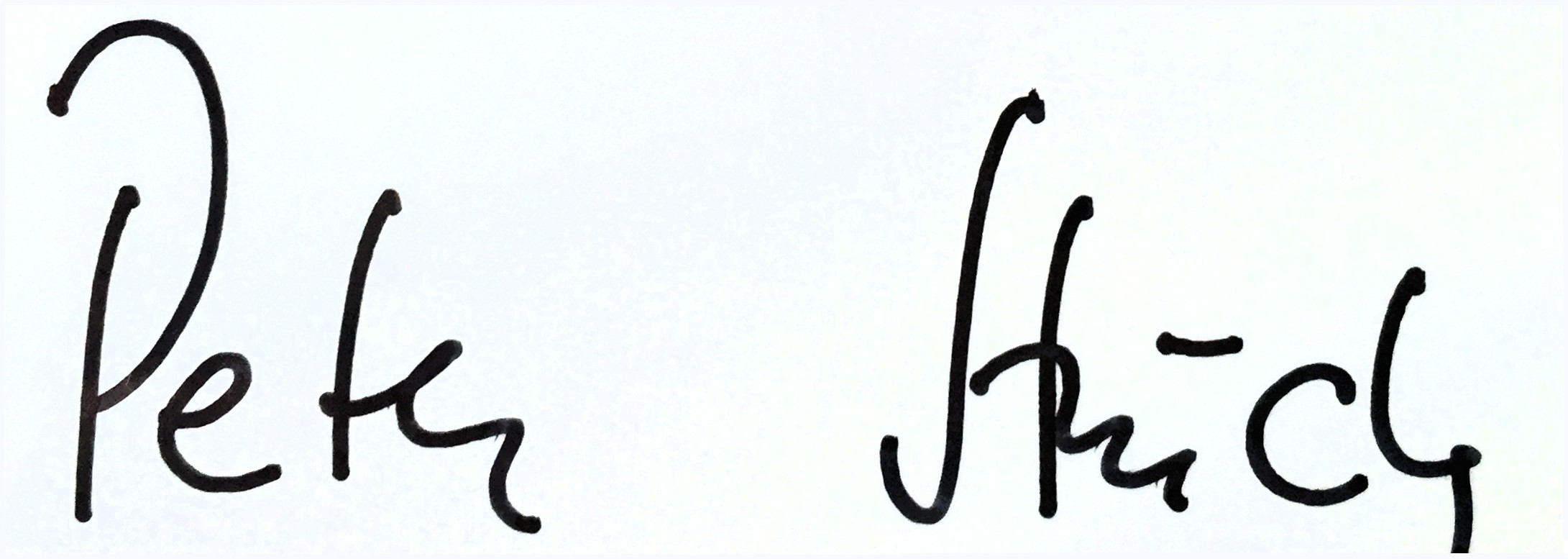 Original Autogramm Peter Struck